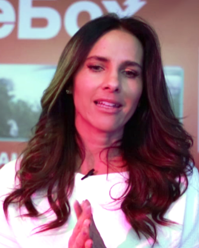 Paola Turbay, cofundadora de IndieBo nos cuenta la importancia apoyar a los creadores y emprendedores colombianos.